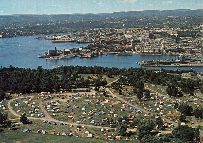 Ekeberg Camping ved Ekebergsletta, campingplass, telt, campingvogner, biler. Ekebergskogen. Panorama over indre Oslofjord og byen. Bispevika, Bjørvika, Vippetangen, Akershus festning, Kvadraturen. Postkort. (Flyfoto).